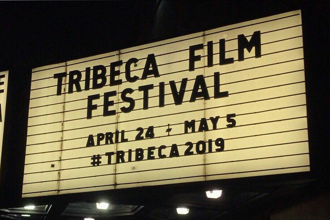 Tribeca Marque